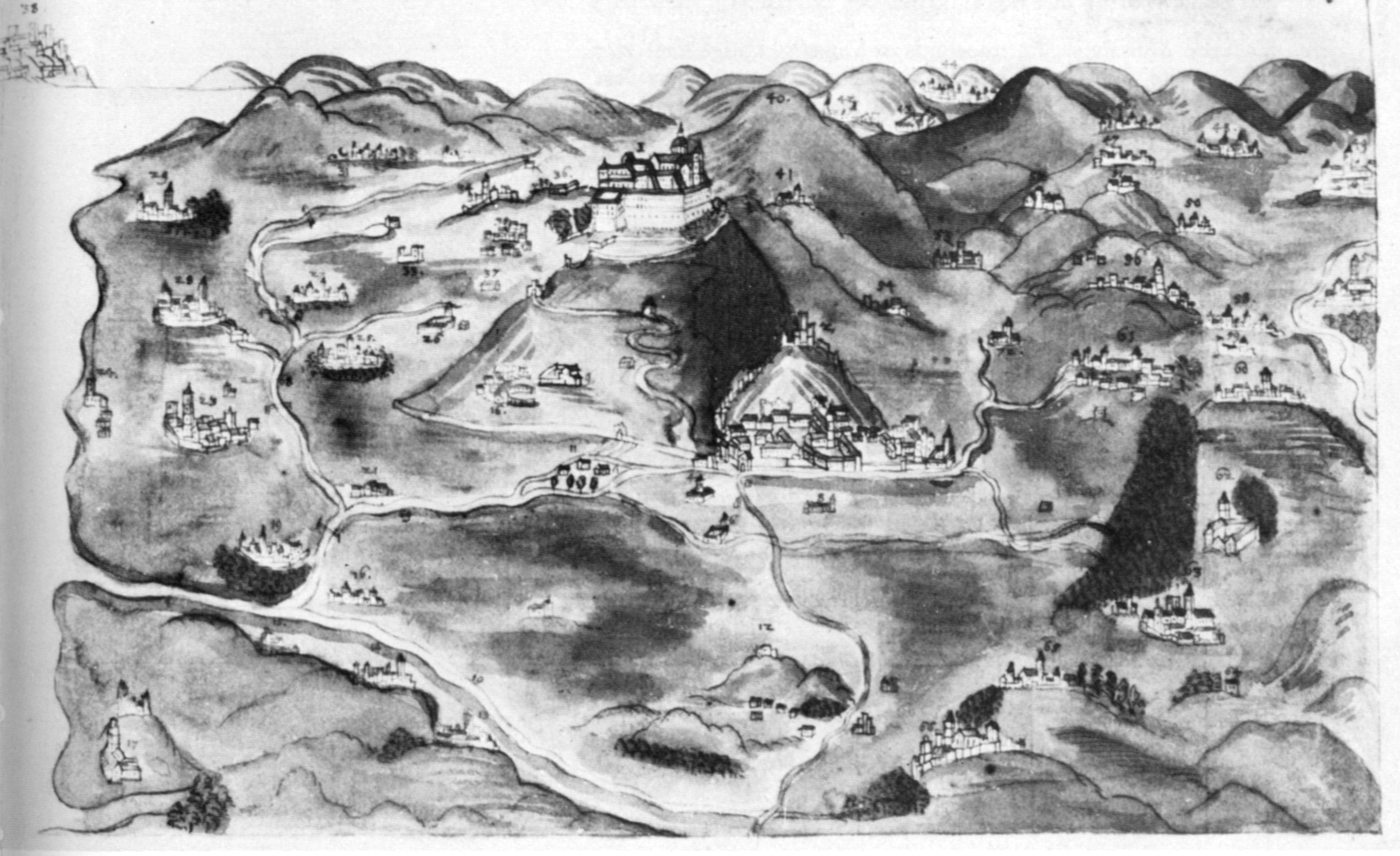 Erzkloster Montecassino aus der Vogelschau (nach einer fremden Vorlage), aus: Württembergische Landesbibliothek, HB V 2 fol 6r und 5v, siehe auch Legende